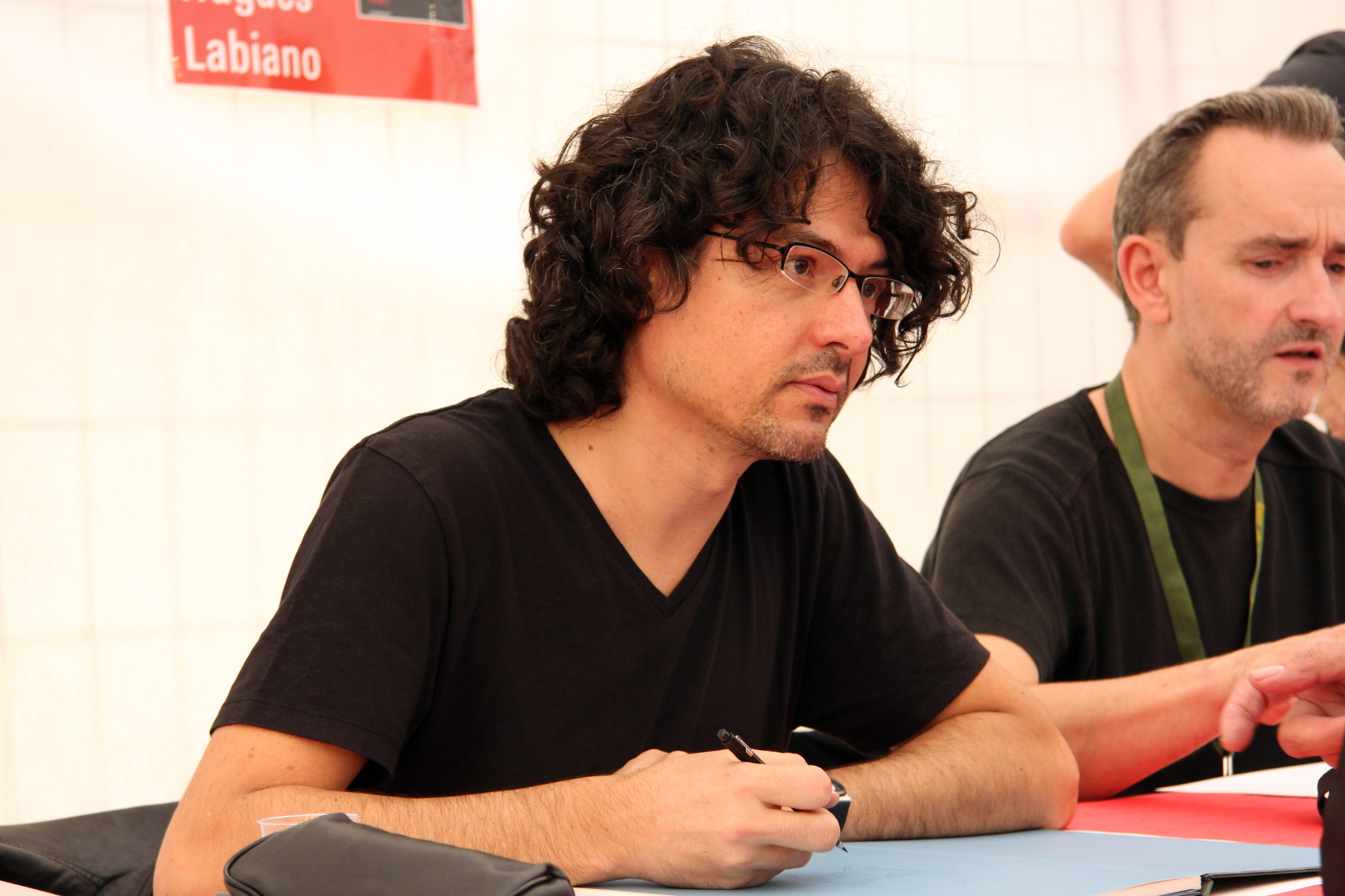 Jaime Martin en dédicace à BD-FIL, à Lausanne.